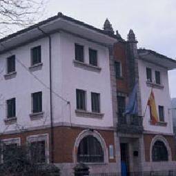 Ayuntamiento de Amieva